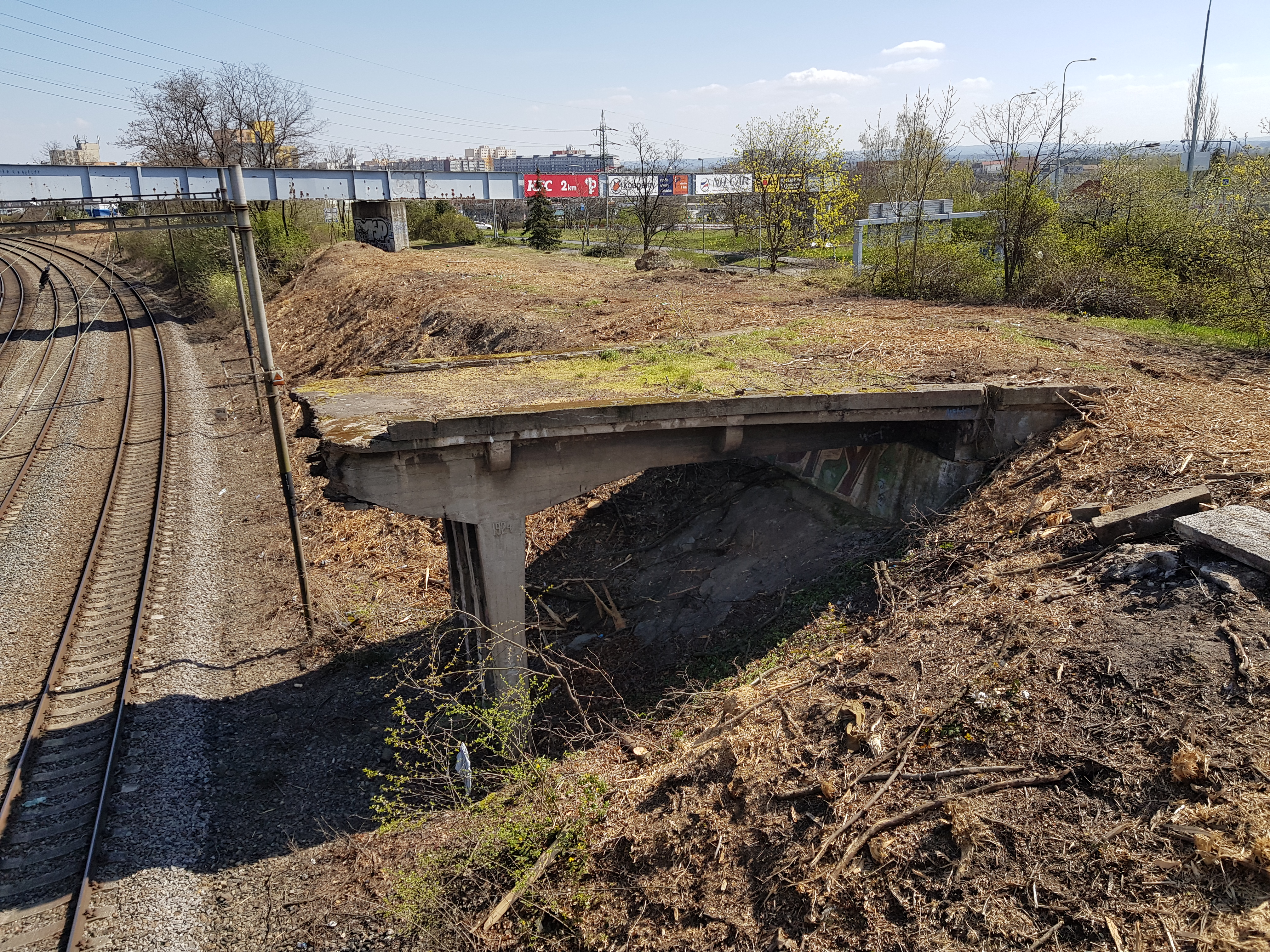 Praha-Kyje, zbytek betonového mostu z roku 1924 přes železniční trať poblíž ulice Za Černým mostem